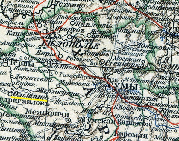 Часть Харьковской губернии